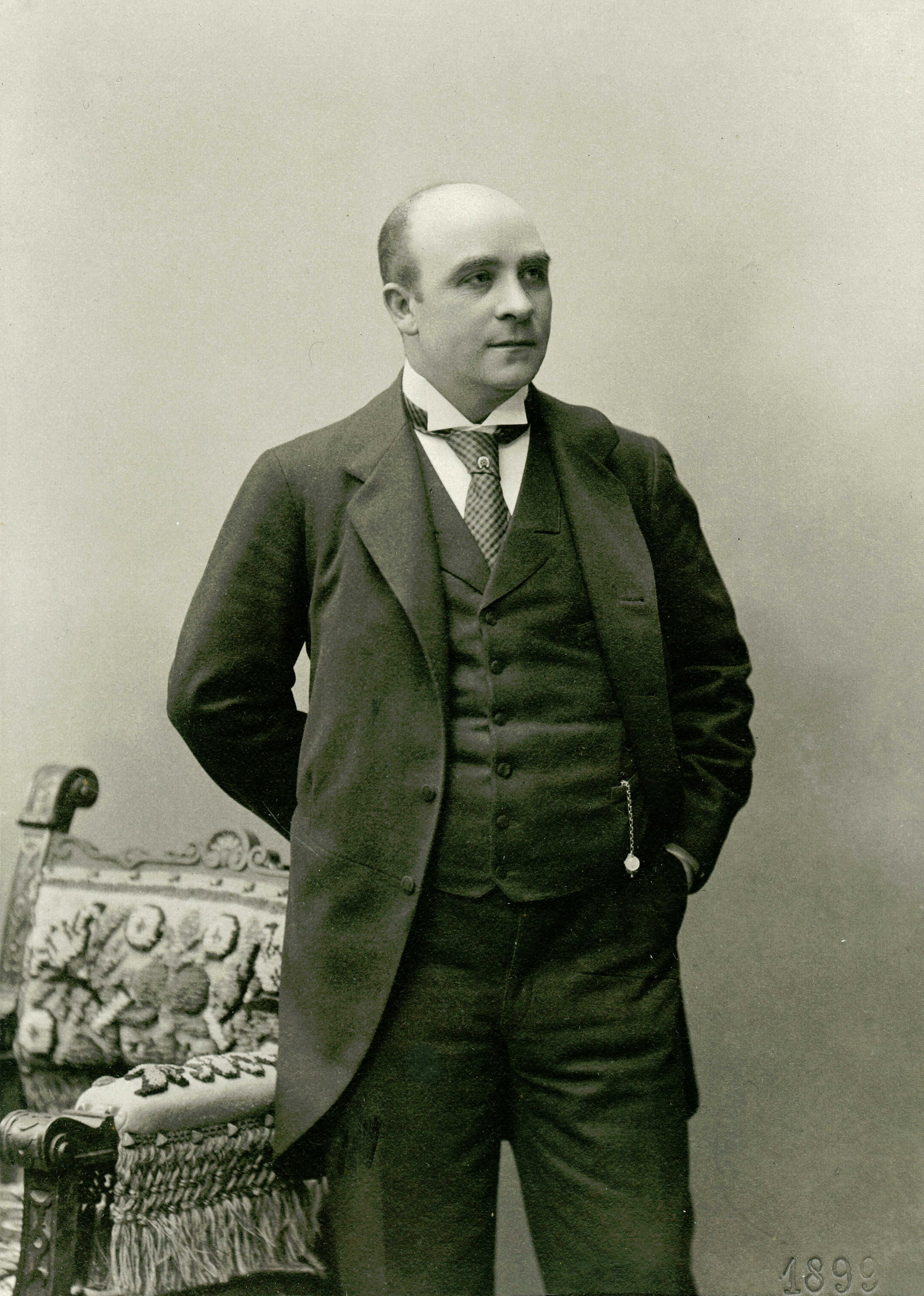 John Riégo, skådespelare vid Albert Ranfts sällskap 1899-1900